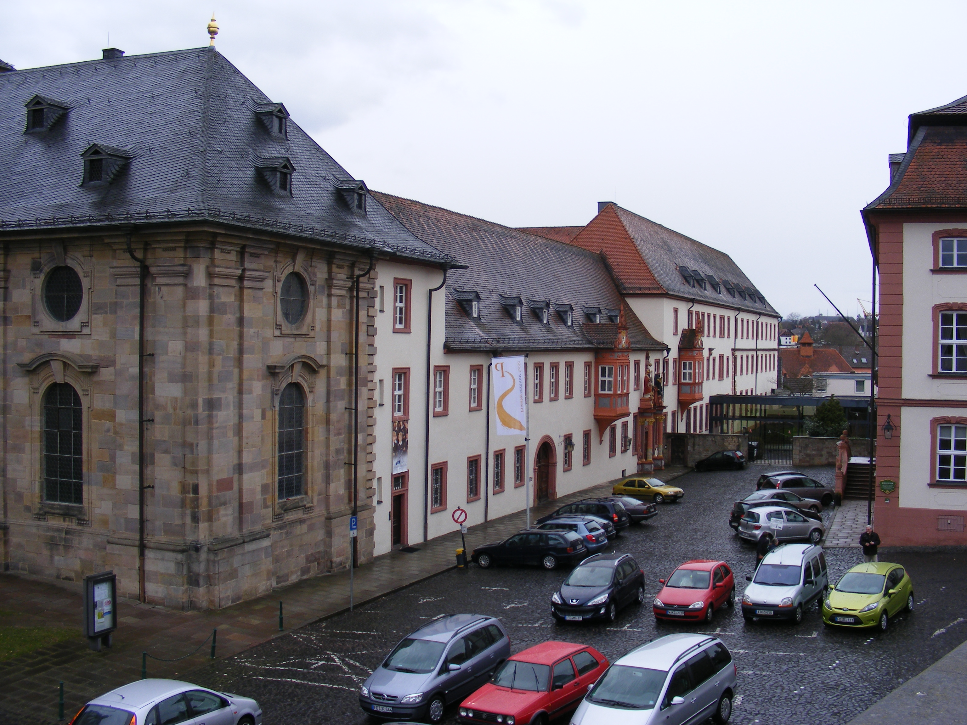 Fulda - Theologische Fakultät: Teilansicht (links: Universitätsgebäude, mittig: Bibliothek, links ein Teil des Fuldaer Doms, die Marienkapelle; die neuerrichtete Aula ist nicht im Bild [rechts])